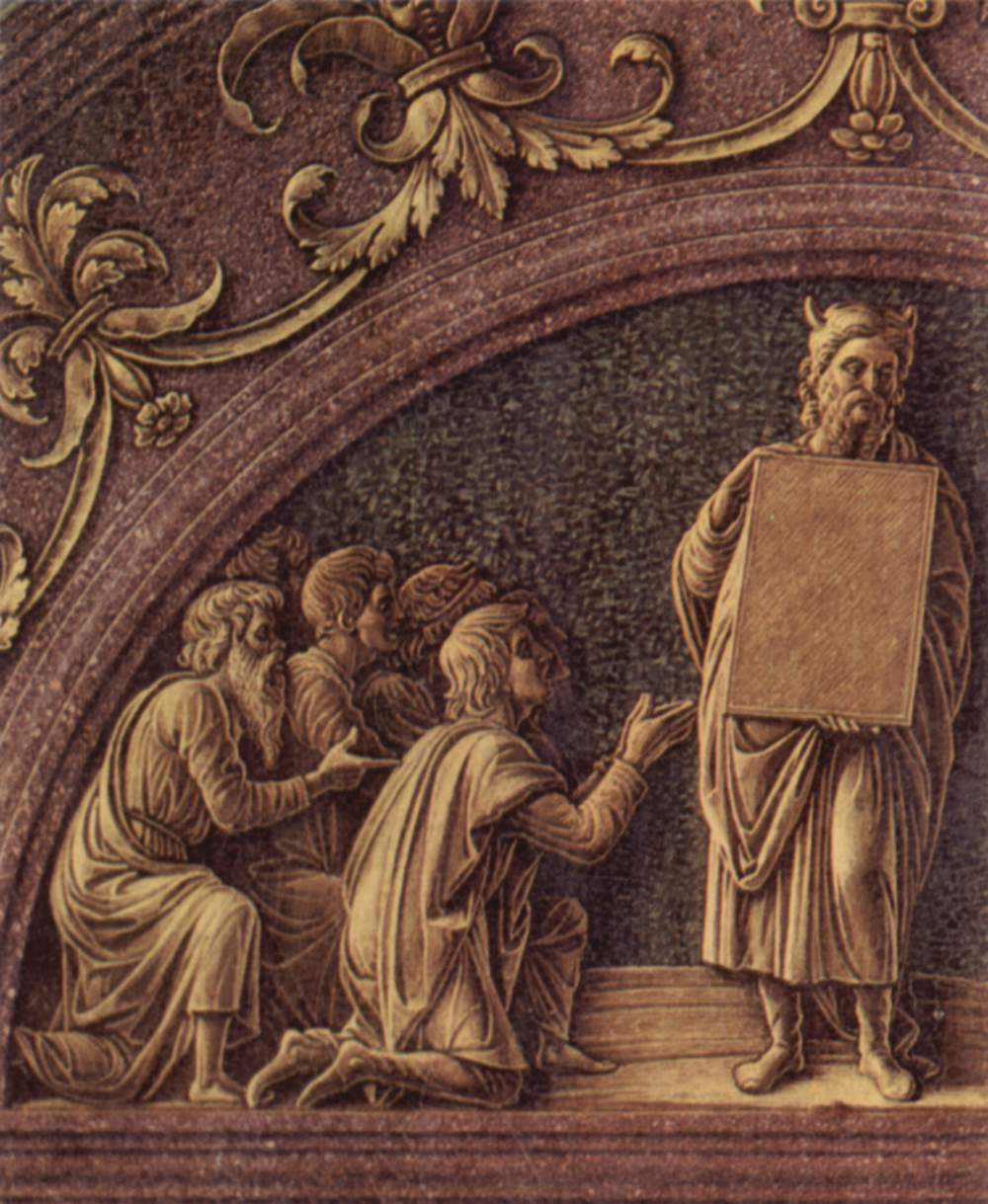 Altarretabel der Palastkapelle des Herzogs von Mantua